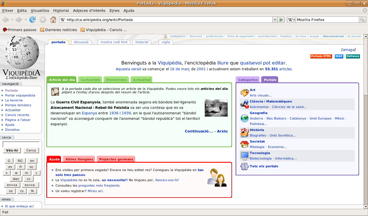 Captura de pantalla del Mozilla Firefox 2.0 en català